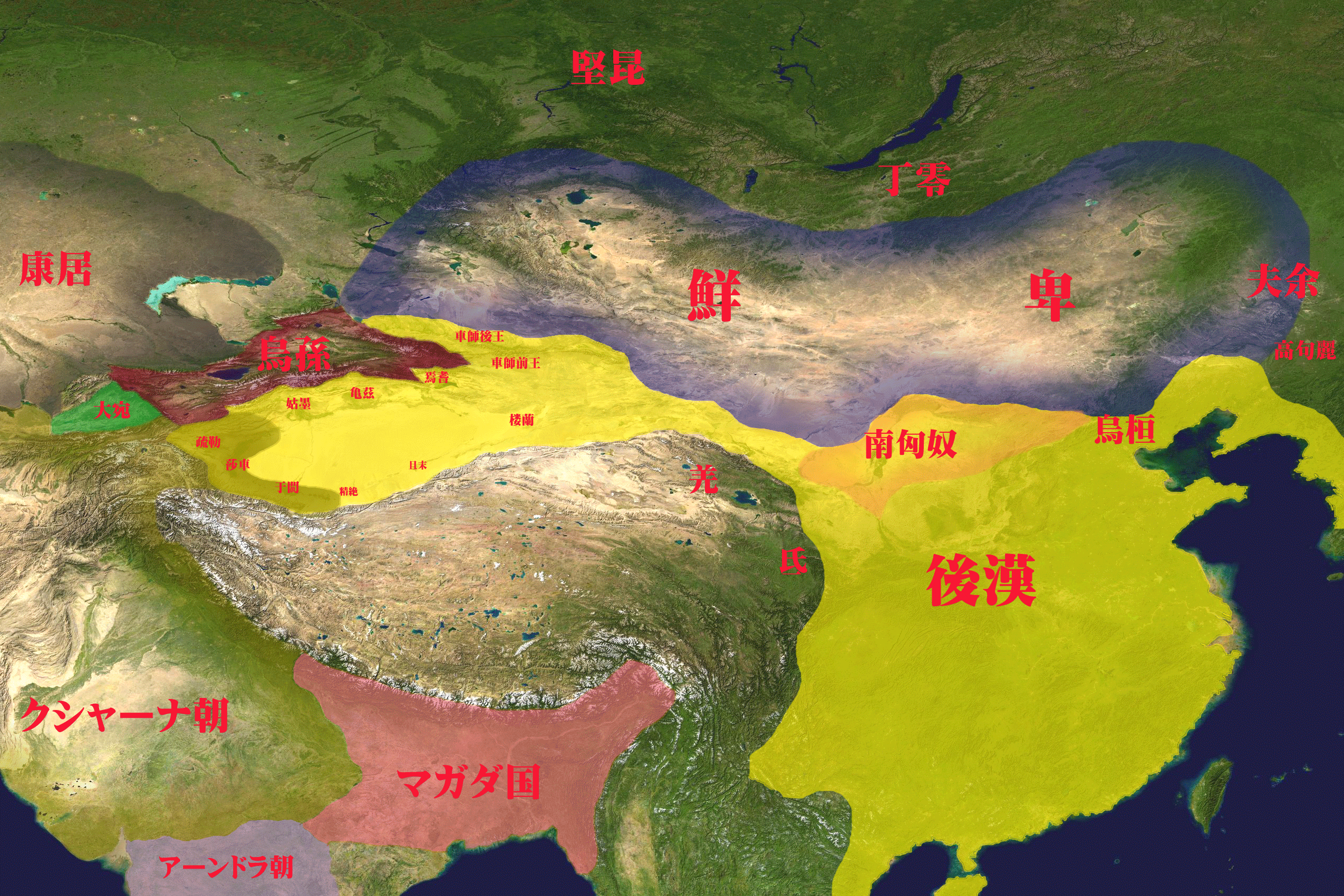 2世紀頃の鮮卑とその周辺国。